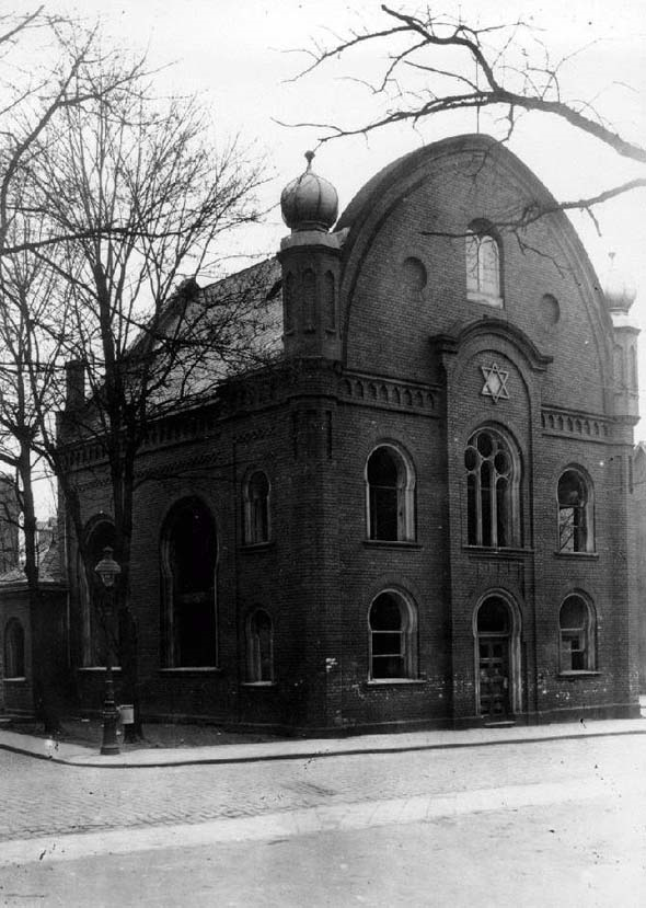 Ausgebrannte Synagoge in Frankfurt-Höchst im November 1938